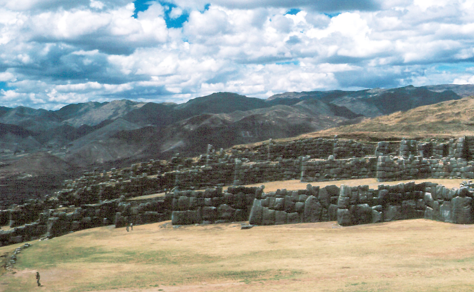 Ruinen von Sacsayhuaman bei Cusco (Peru).